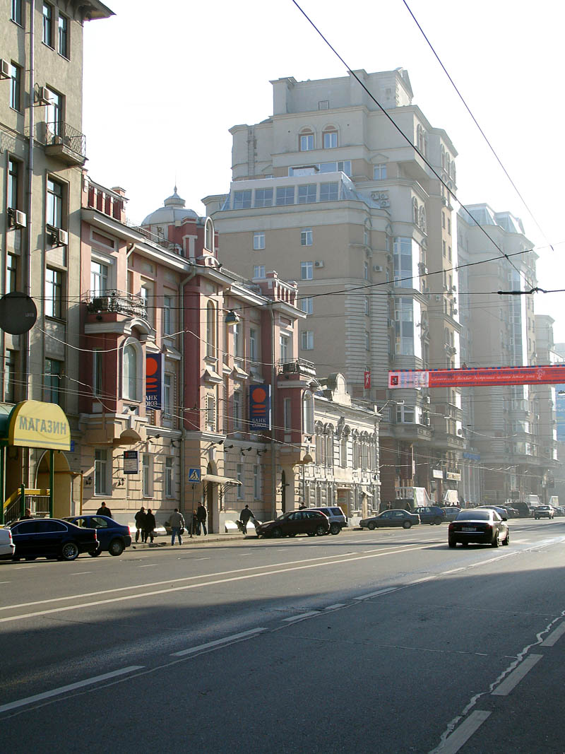 Долгоруковская улица Dolgorukovskaya Street, Moscow